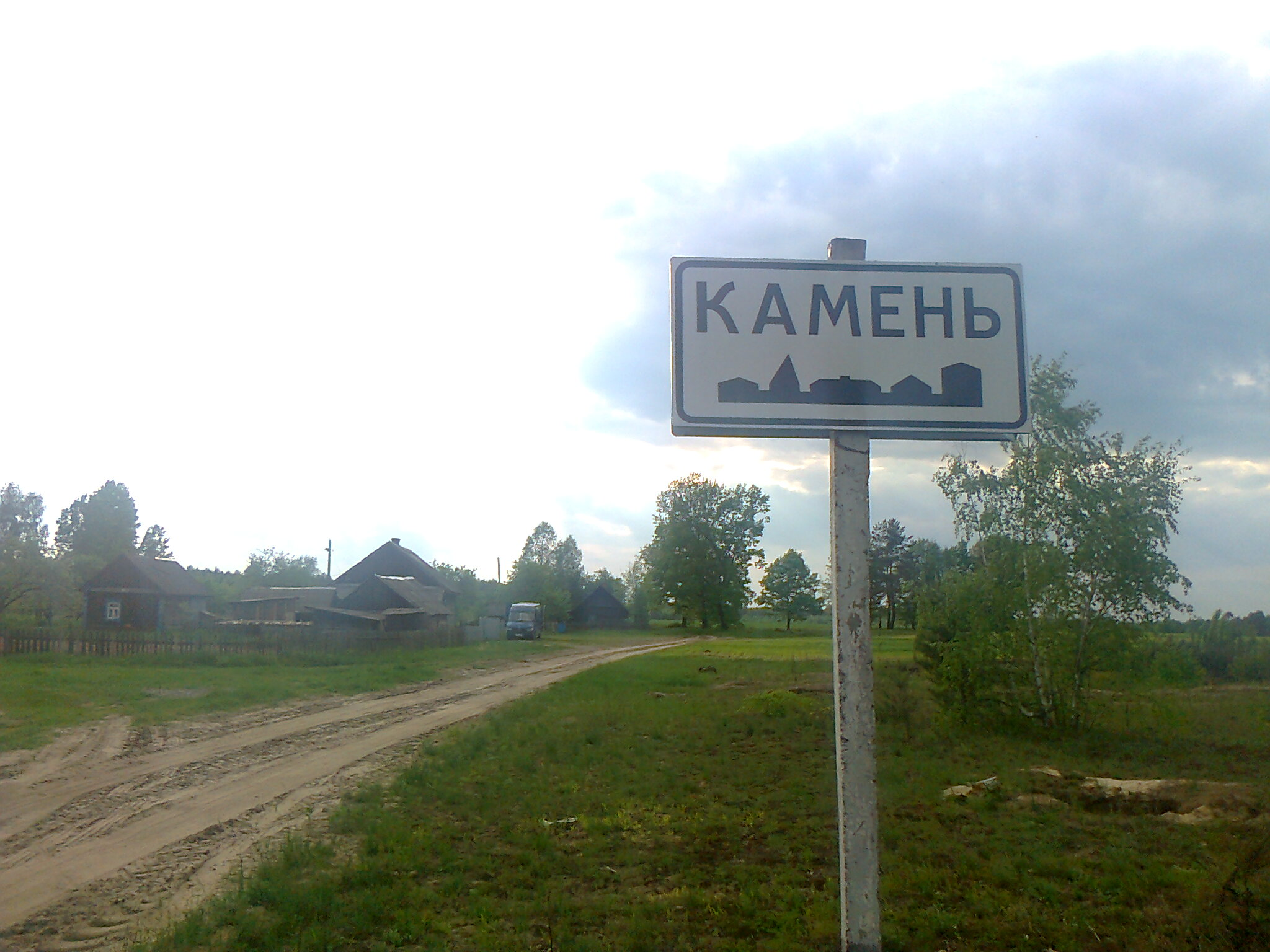 Знак у въезда в посёлок